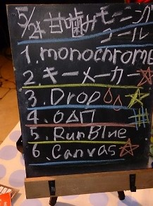 amiinaセトリボード(20150524(1))